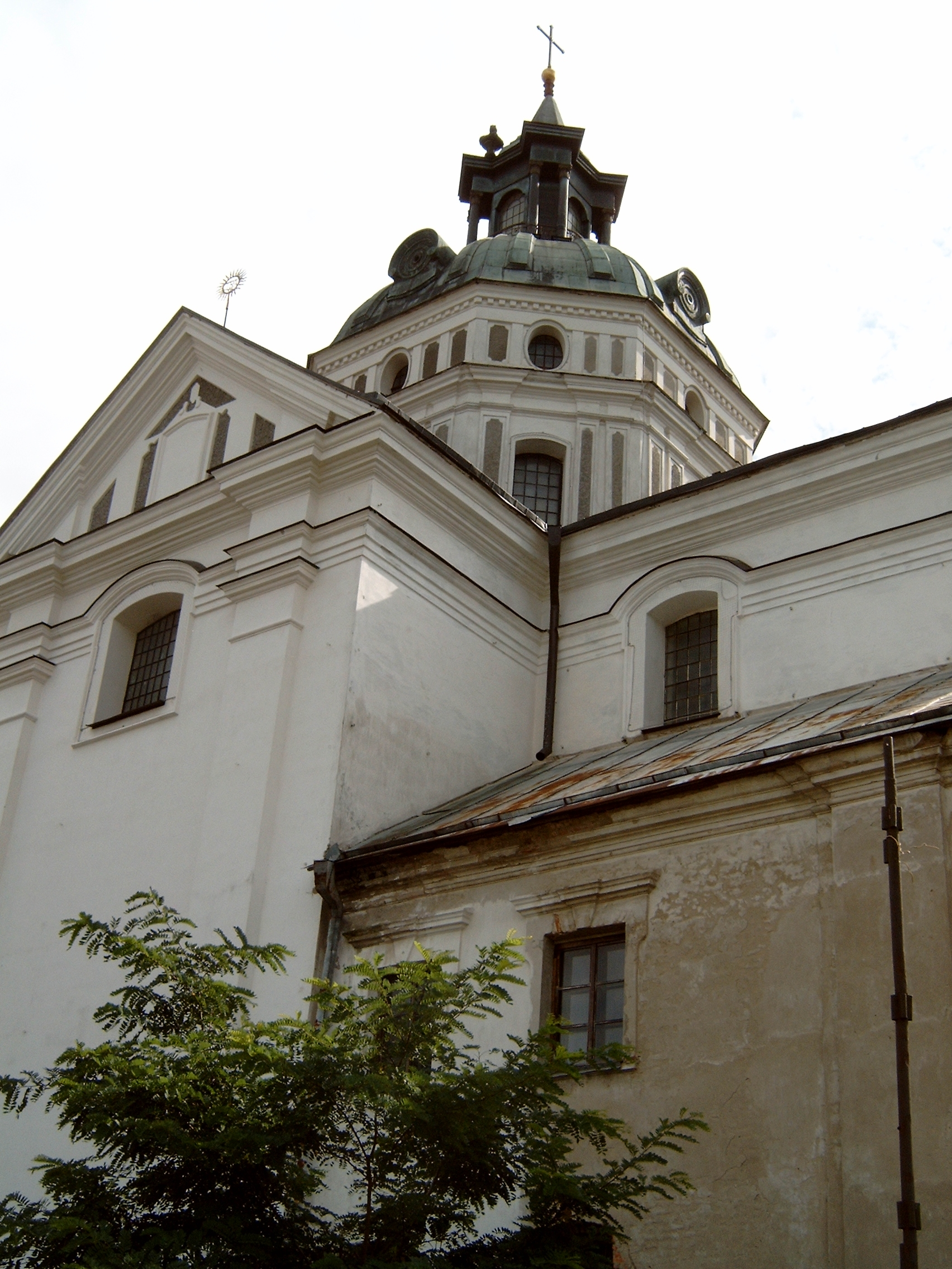 Монастир Кармелітів Босих.: Монастир Кармелітів Босих в Бердичеві. Купол костелу.